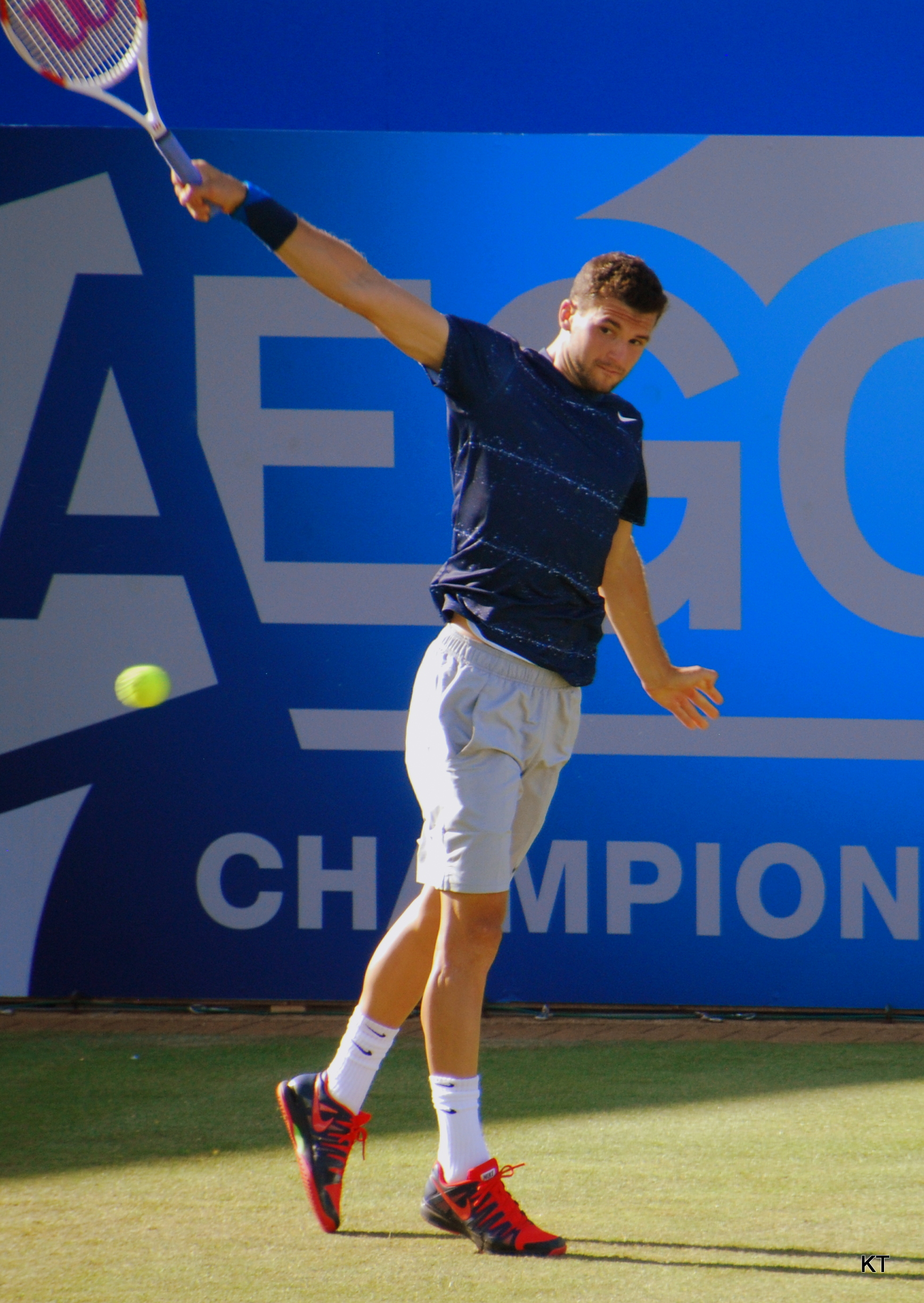 Grigor Dimitrov